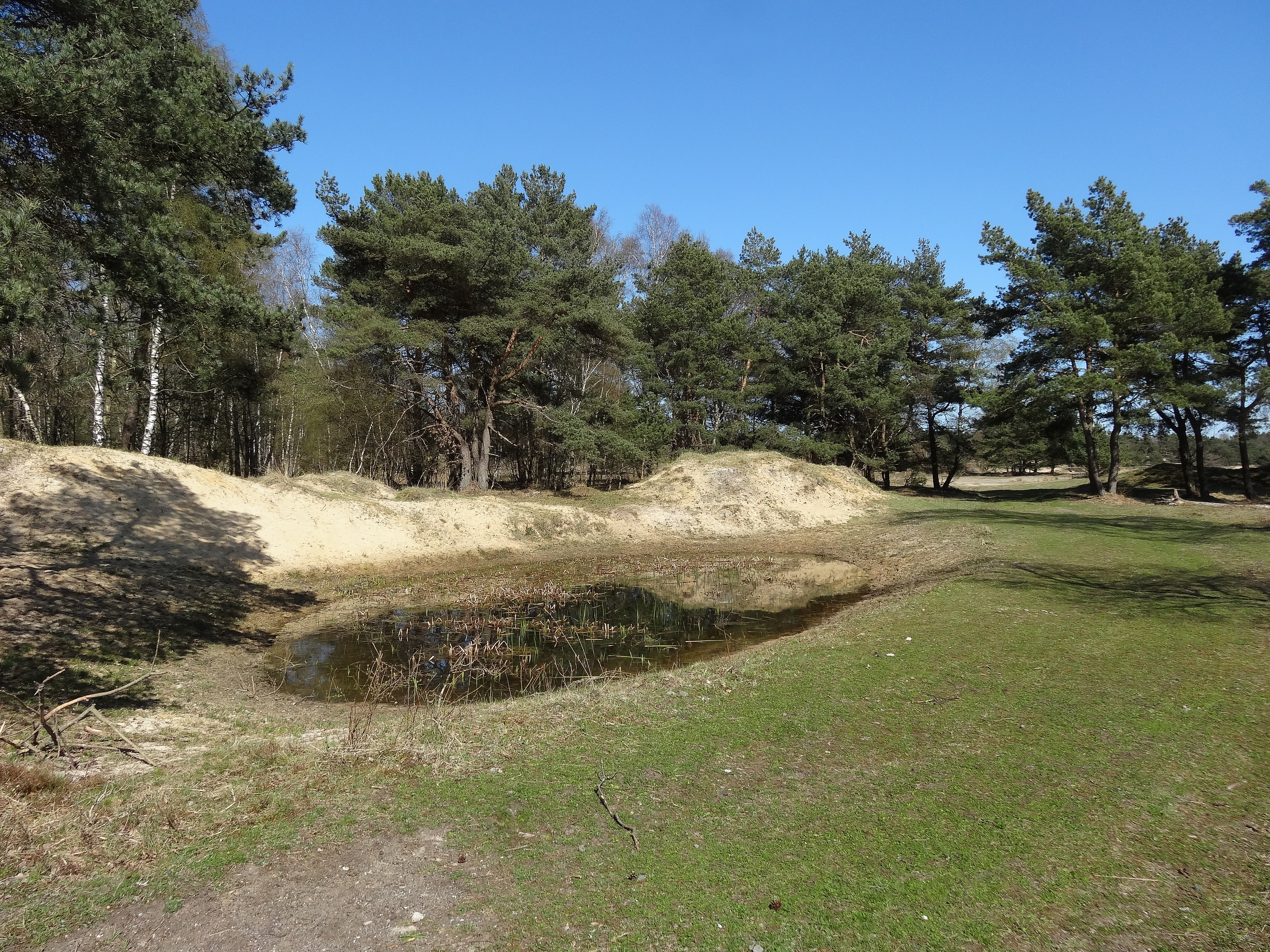 Impressionen Frühjahr 2013 Der ehemalige Truppenübungsplatz der Freiherr-von-Fritsch-Kaserne (Breitenburg) ist heute ein "Sichergestelltes Gebiet" des Ministeriums für Landwirtschaft, Umwelt und ländliche Räume des Landes Schleswig-Holstein für ein geplantes Naturschutzgebiet "Binnendünen Nordoe"